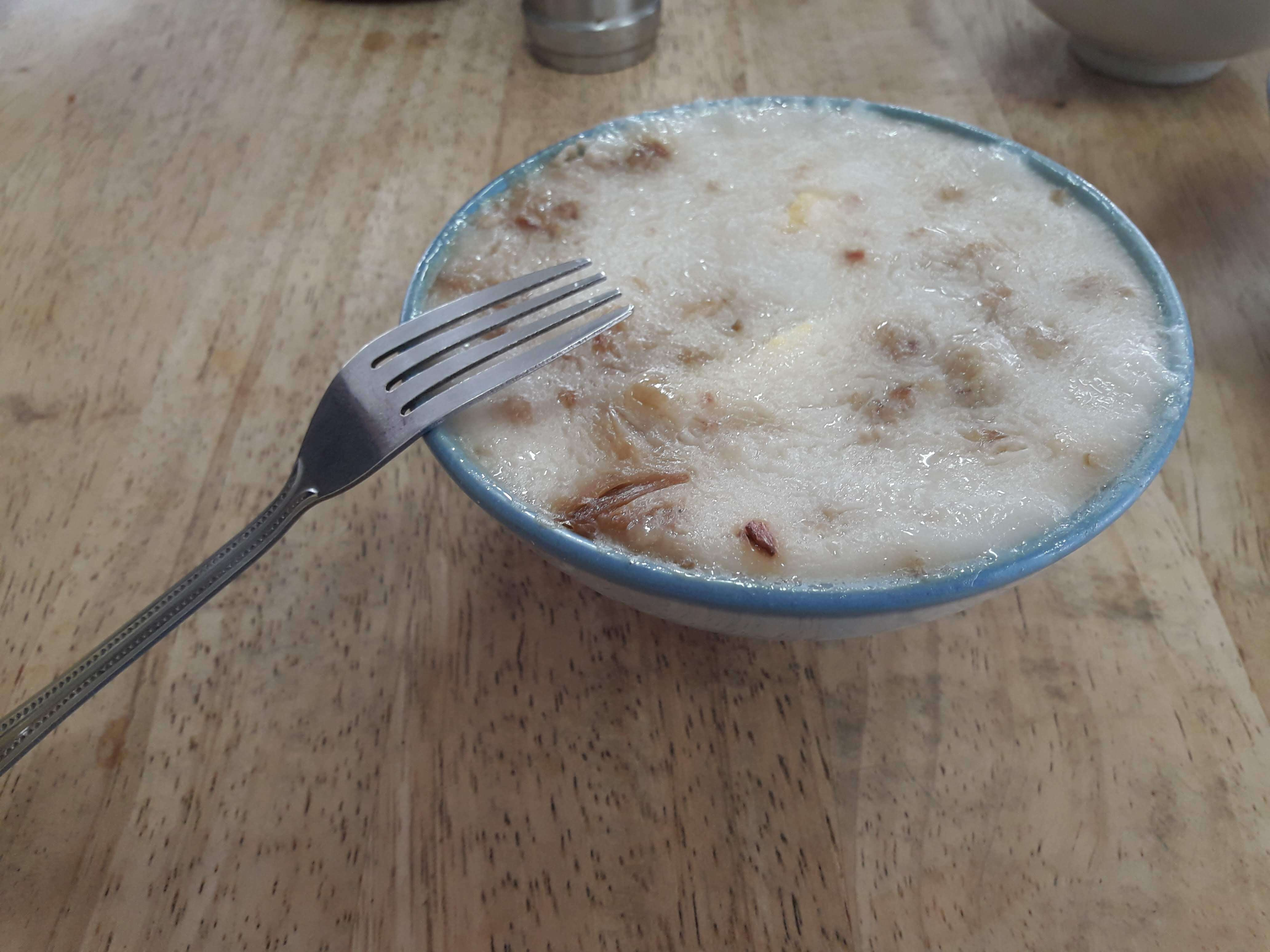 臺南碗粿。